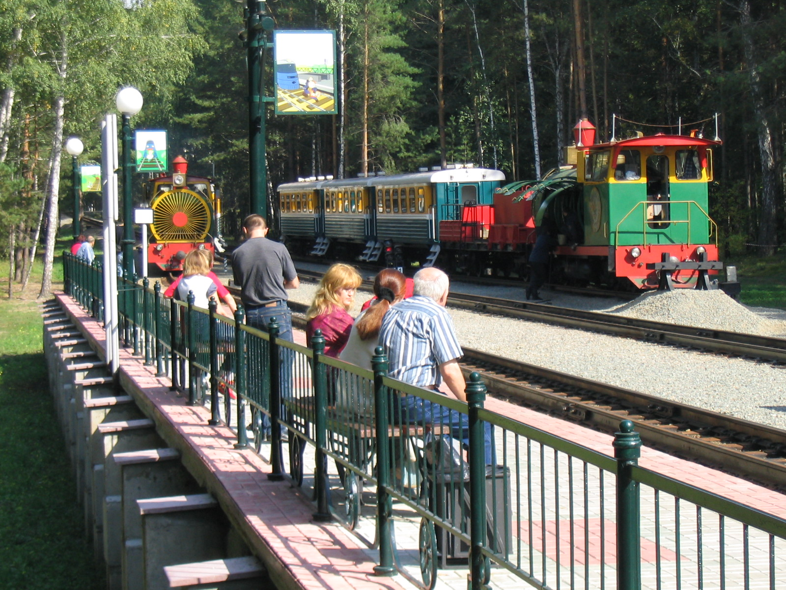 Заельцовский_бор_-_детская_железная_дорога